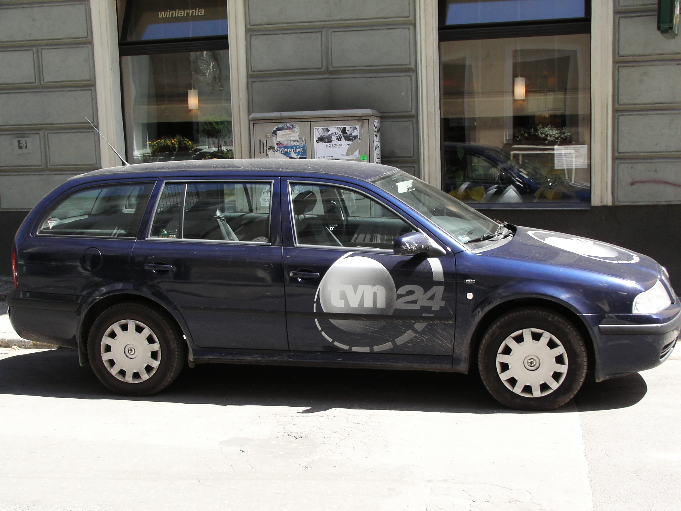 Wóz reporterski TVN24. Skoda Octavia w Poznaniu.